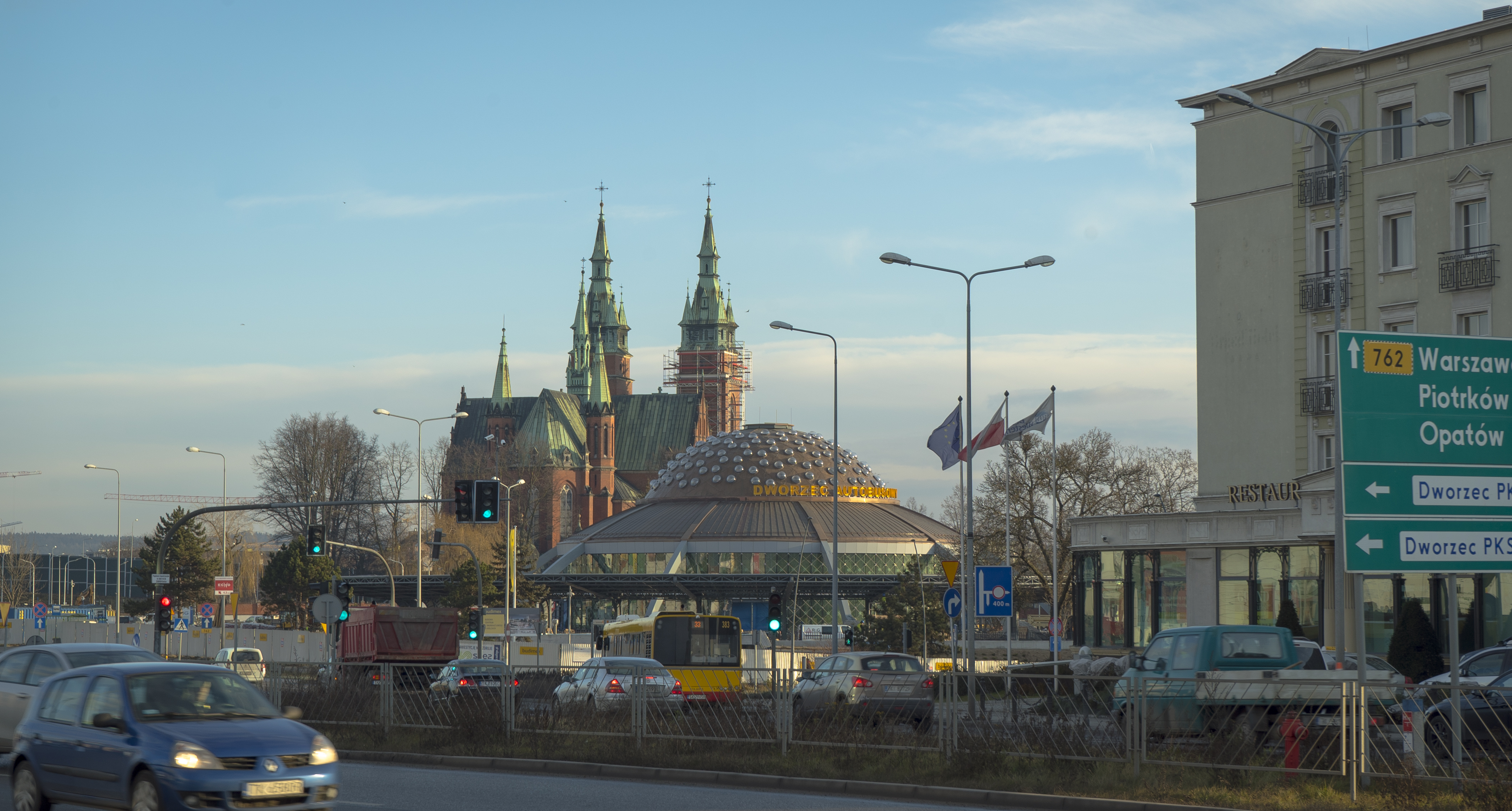 Widok na Kielce z ulicy Żelaznej